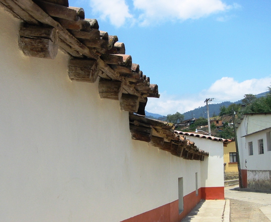 Arquitectura vernácula en Capulálpam de Méndez, viviendas de adobe, teja de arcilla y piedra